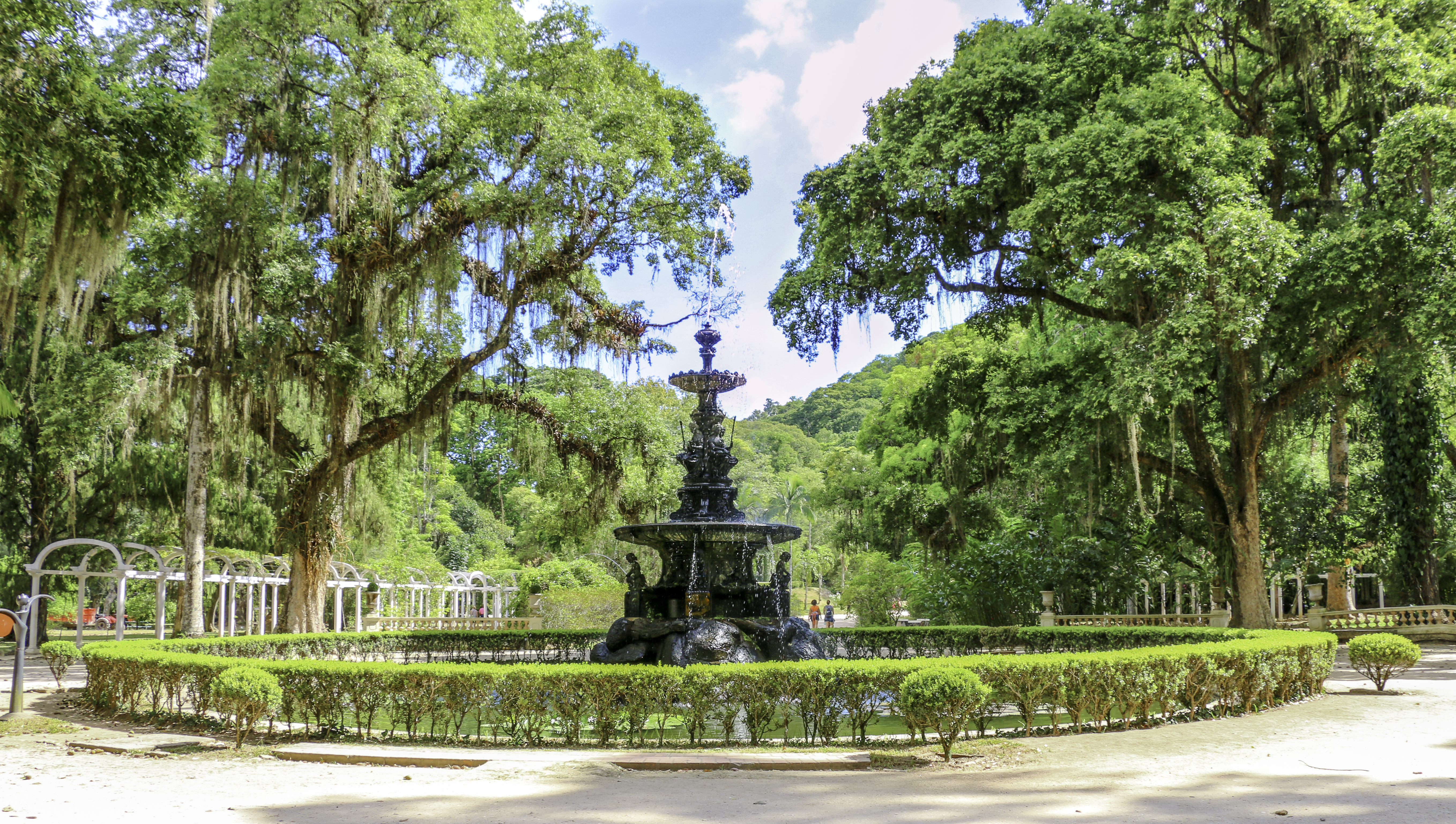 Lindo chafariz emoldurado por lindas árvores. Viva o verde!